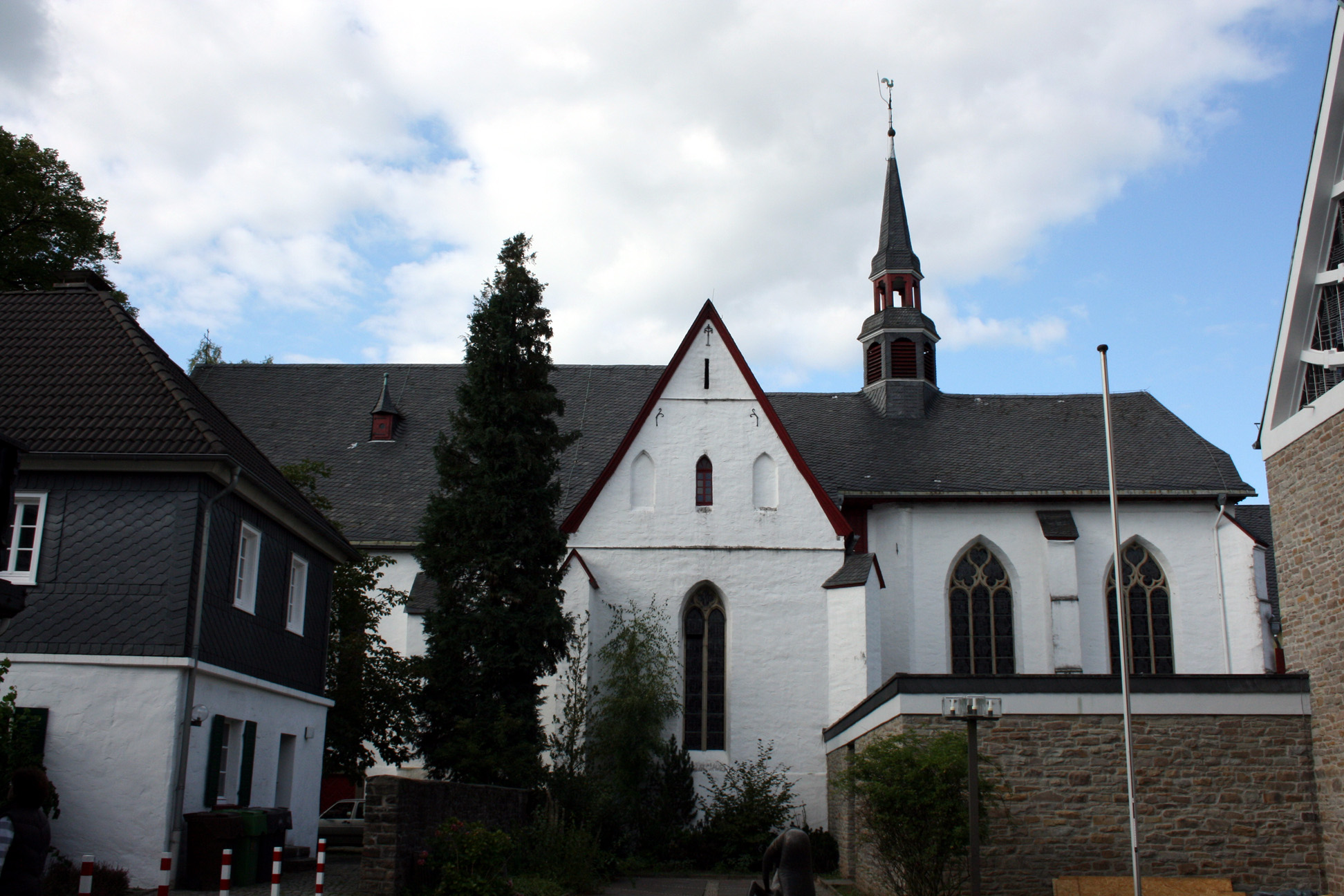 Außenansicht der Wallfahrtskirche St. Maria Heimsuchung in Marienheide